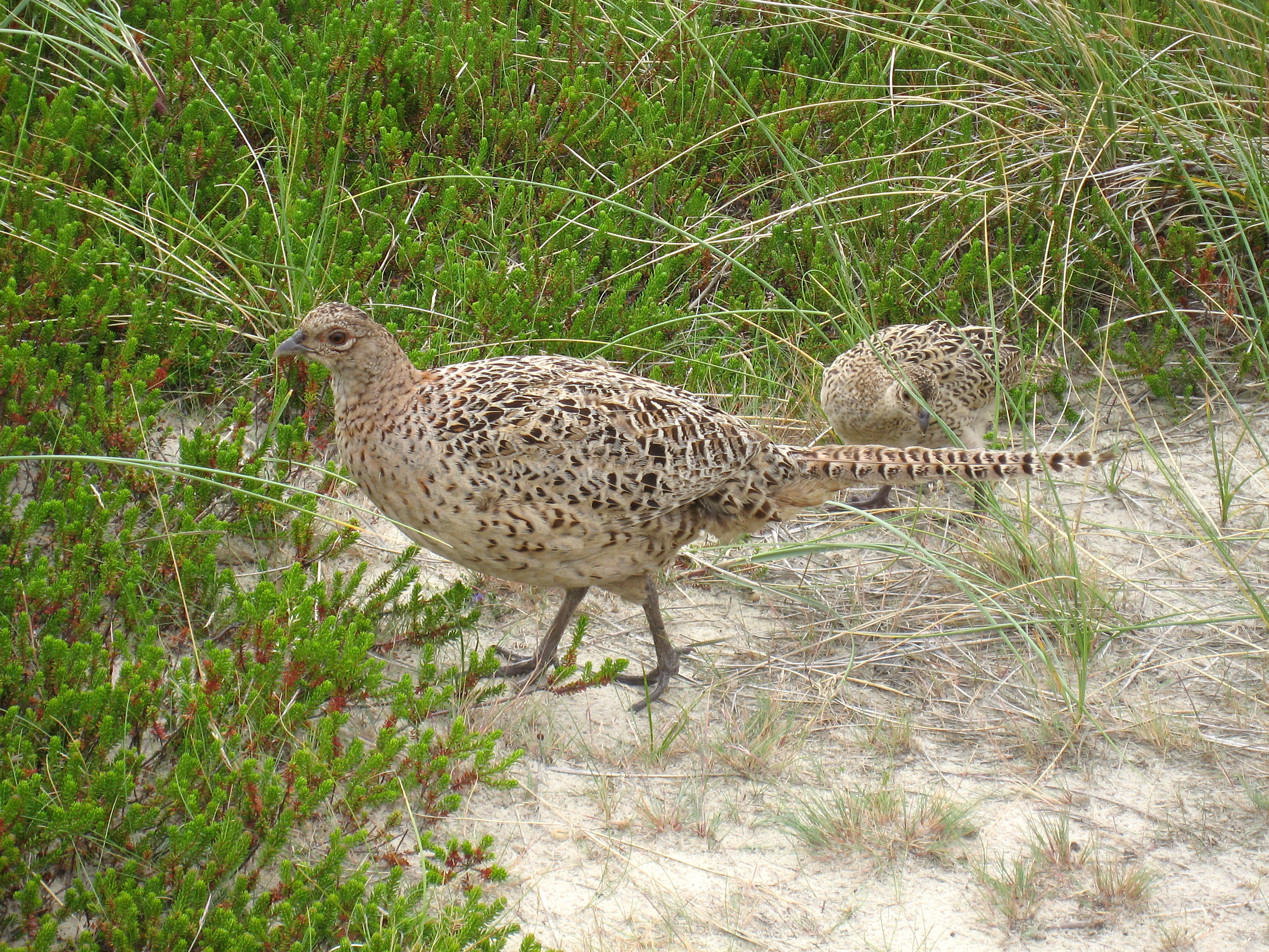 2 Fasane (Phasianus colchicus) in den Dünen der Insel Amrum, Category:Phasianidae